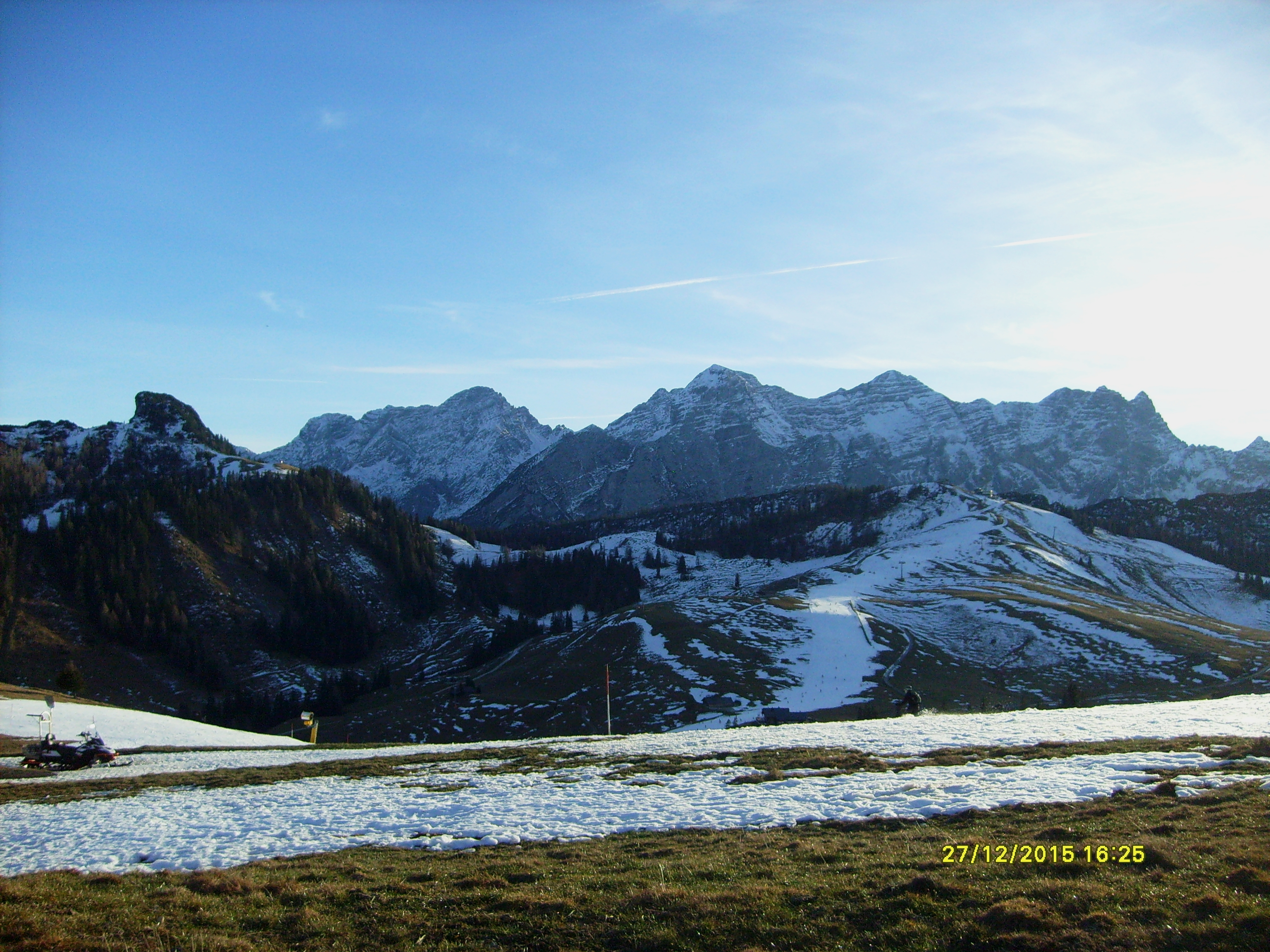 Loferer Alm; Schwarzeck Gipfel (Blick auf Loferer Steinberge mit Großem Ochsenhorn)